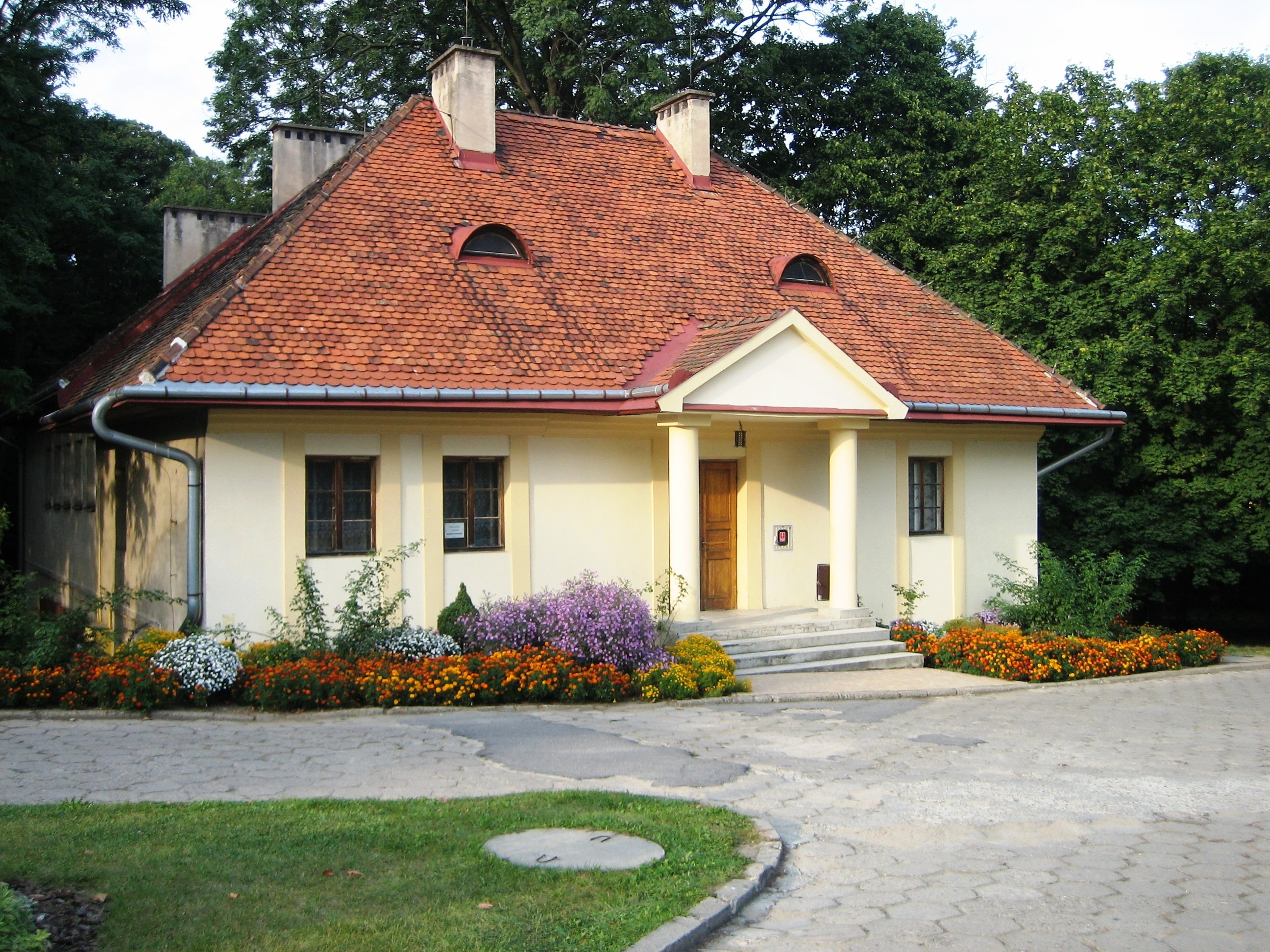 Zespół pałacowy w Tarnowie - oficyna